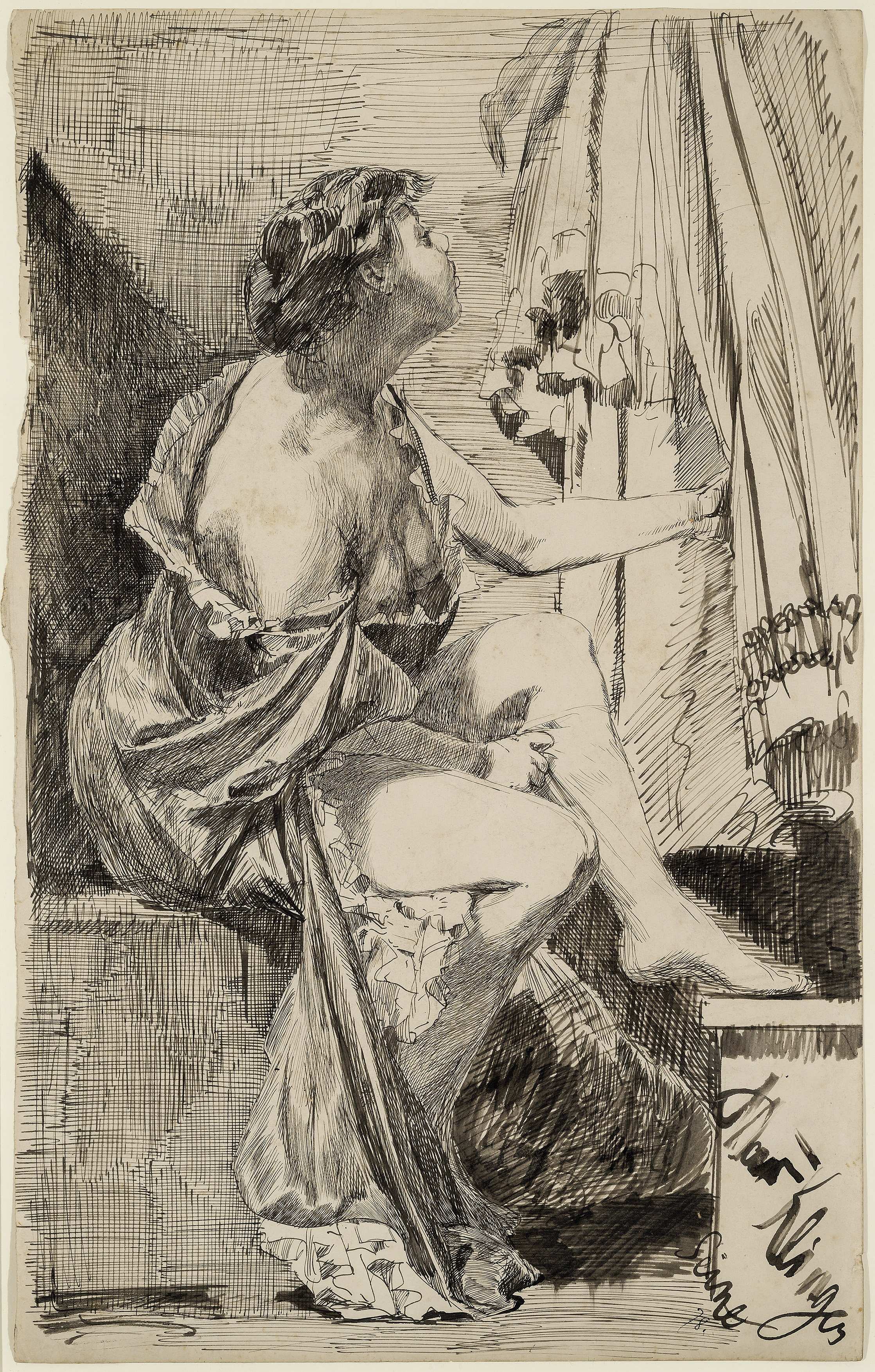 Frau im Boudoir von Max Klinger, Tuschfeder- und Pinselzeichnung, laviert, auf festem Velin, 44,5 x 28 cm, Rechts unten signiert, datiert und bezeichnet „Seine 78“